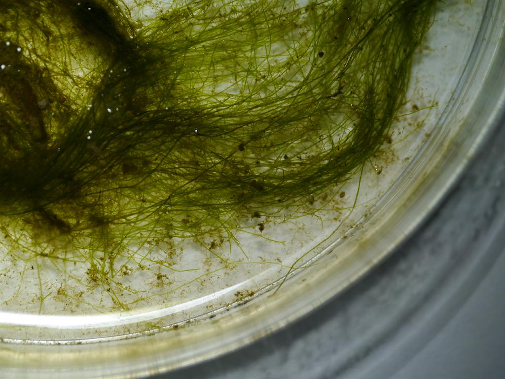 Vaucheria sp：フシナシミドロ 2015/01/10 水田にて採集：from water rice field 和歌山県田辺市：Tanabe City. Wakayama Pref. Japan